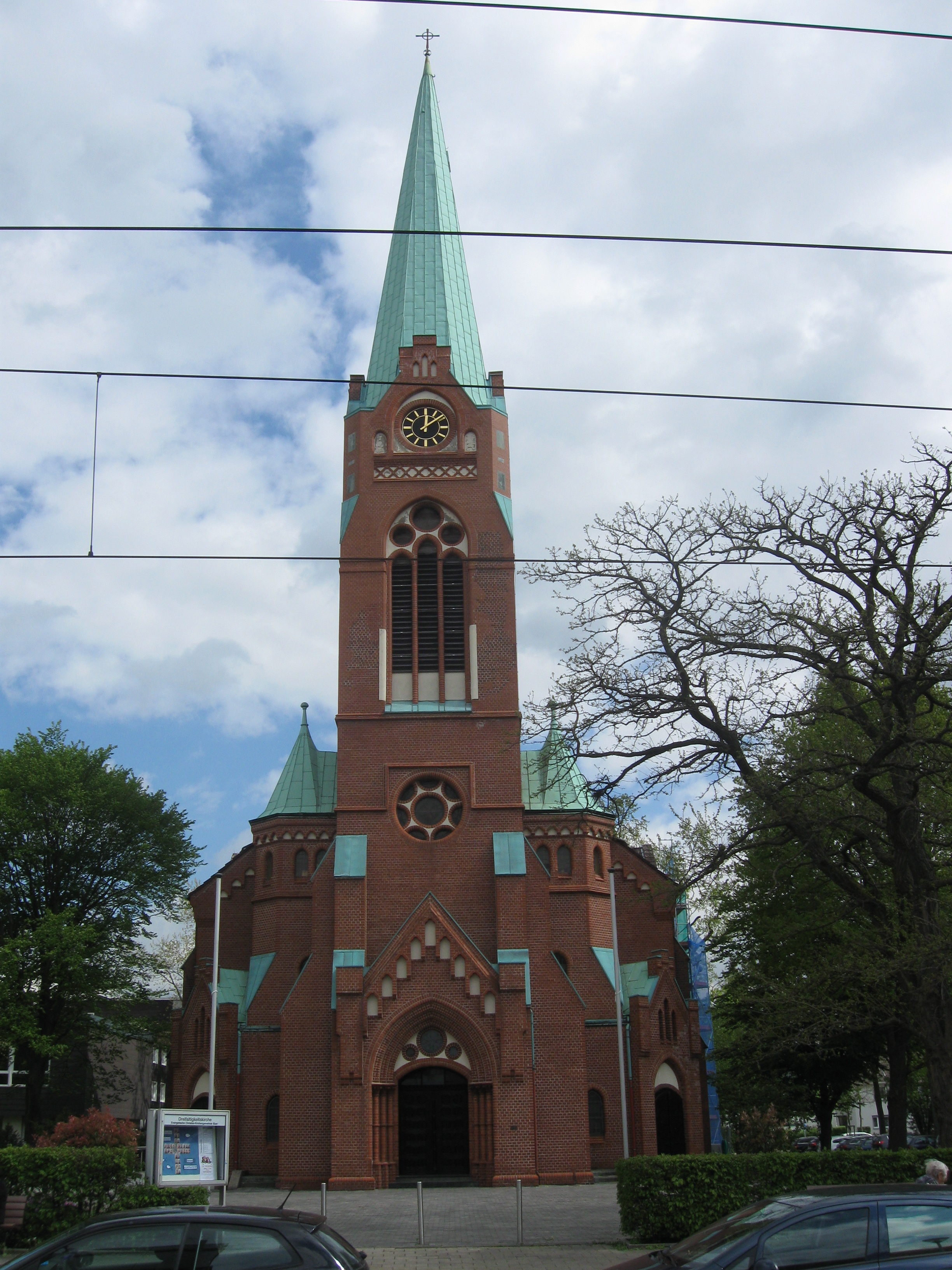 Ev. Dreifaltigkeitskirche in Gelsenkirchen-Erle in der Cranger Straße (erbaut 1902–1903)